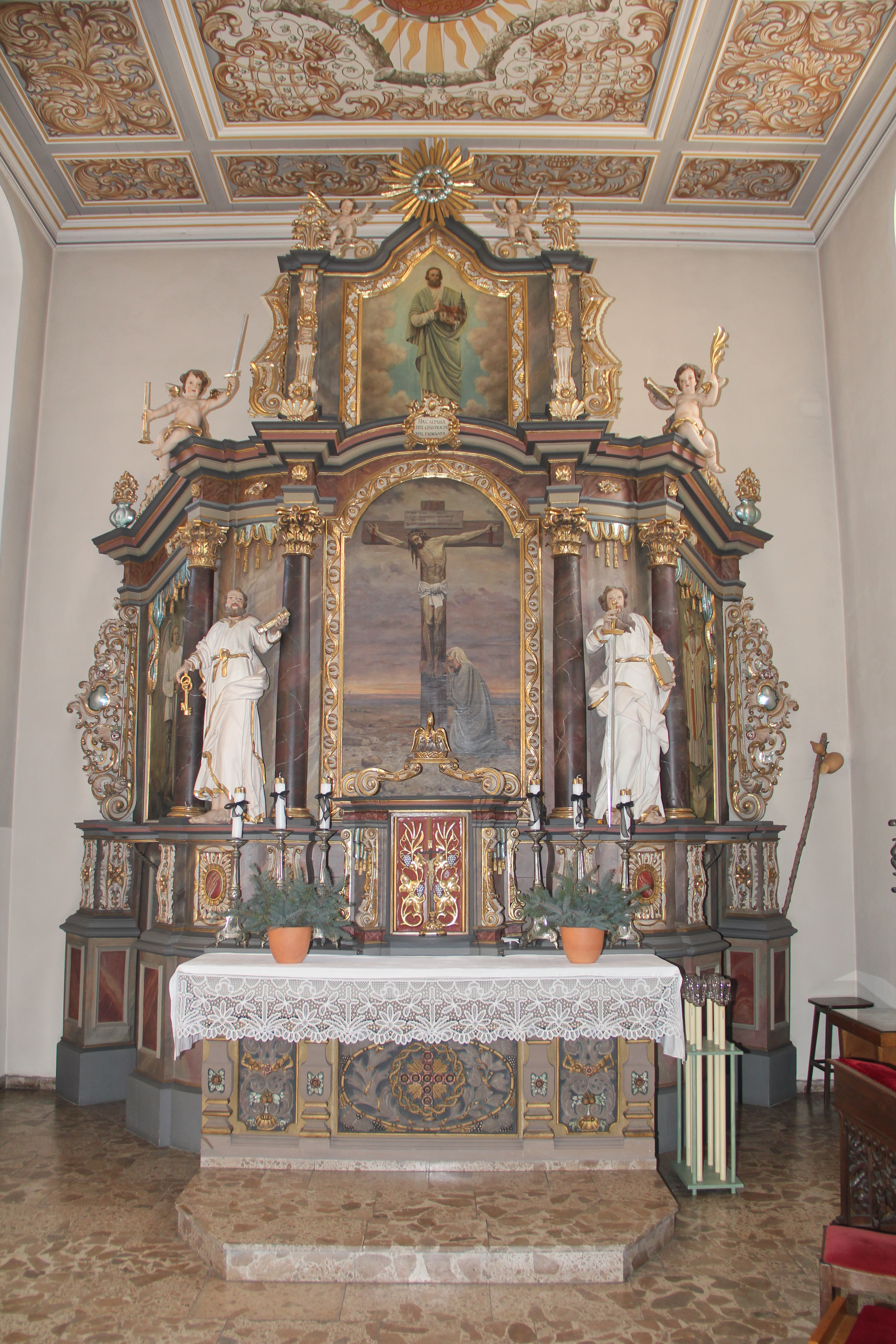 Hochaltar in der St. Jakobuskirche zu Uder im Eichsfeld